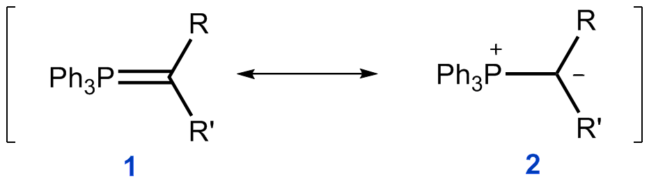 Formes ressonants de l'ilur de trifenilfosfoni